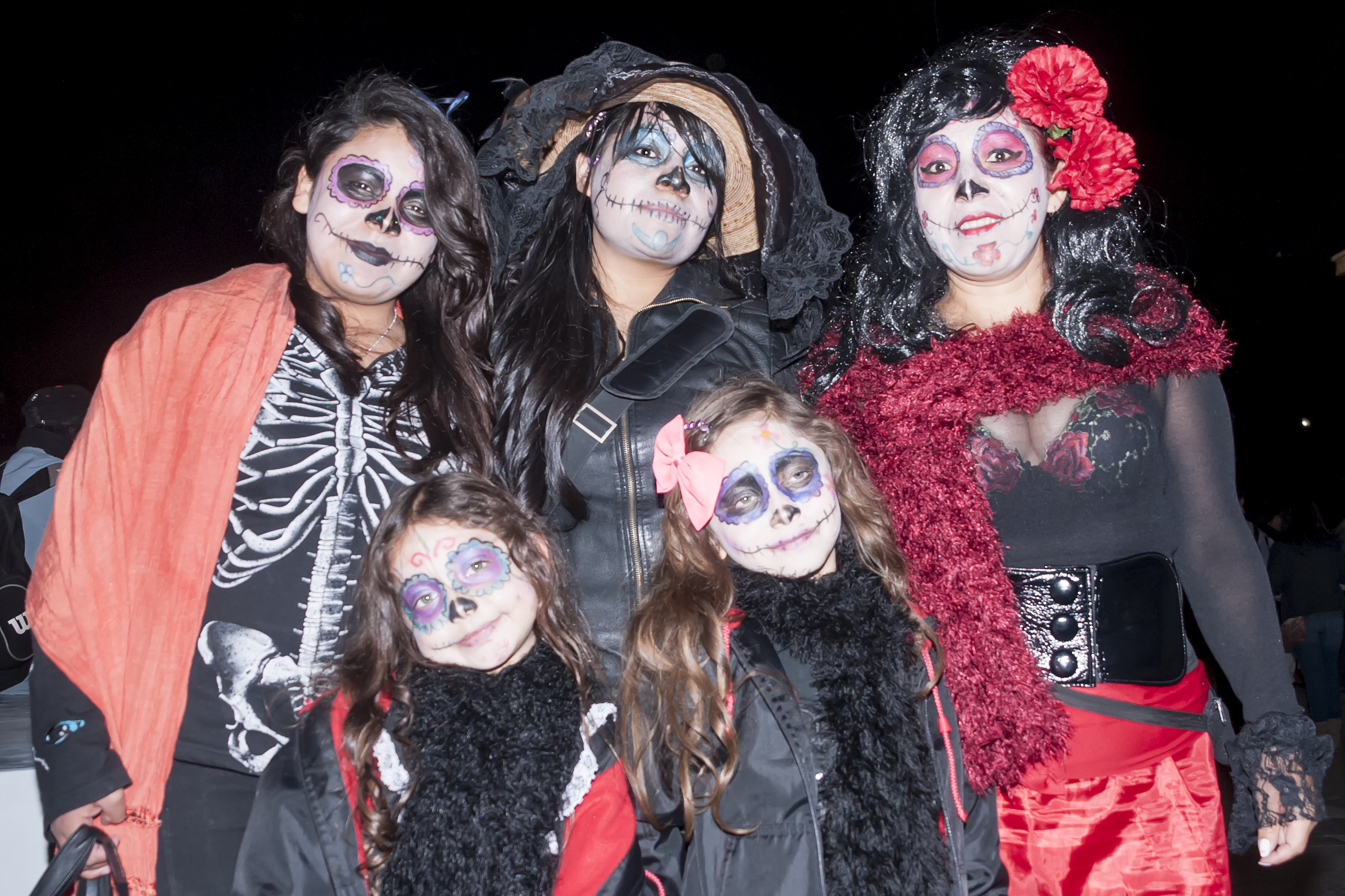 Personas y niños fotografiados cerca de Bellas Artes, disfrazados con motivos del Día de muertos. Colonia Centro de la Ciudad de México.